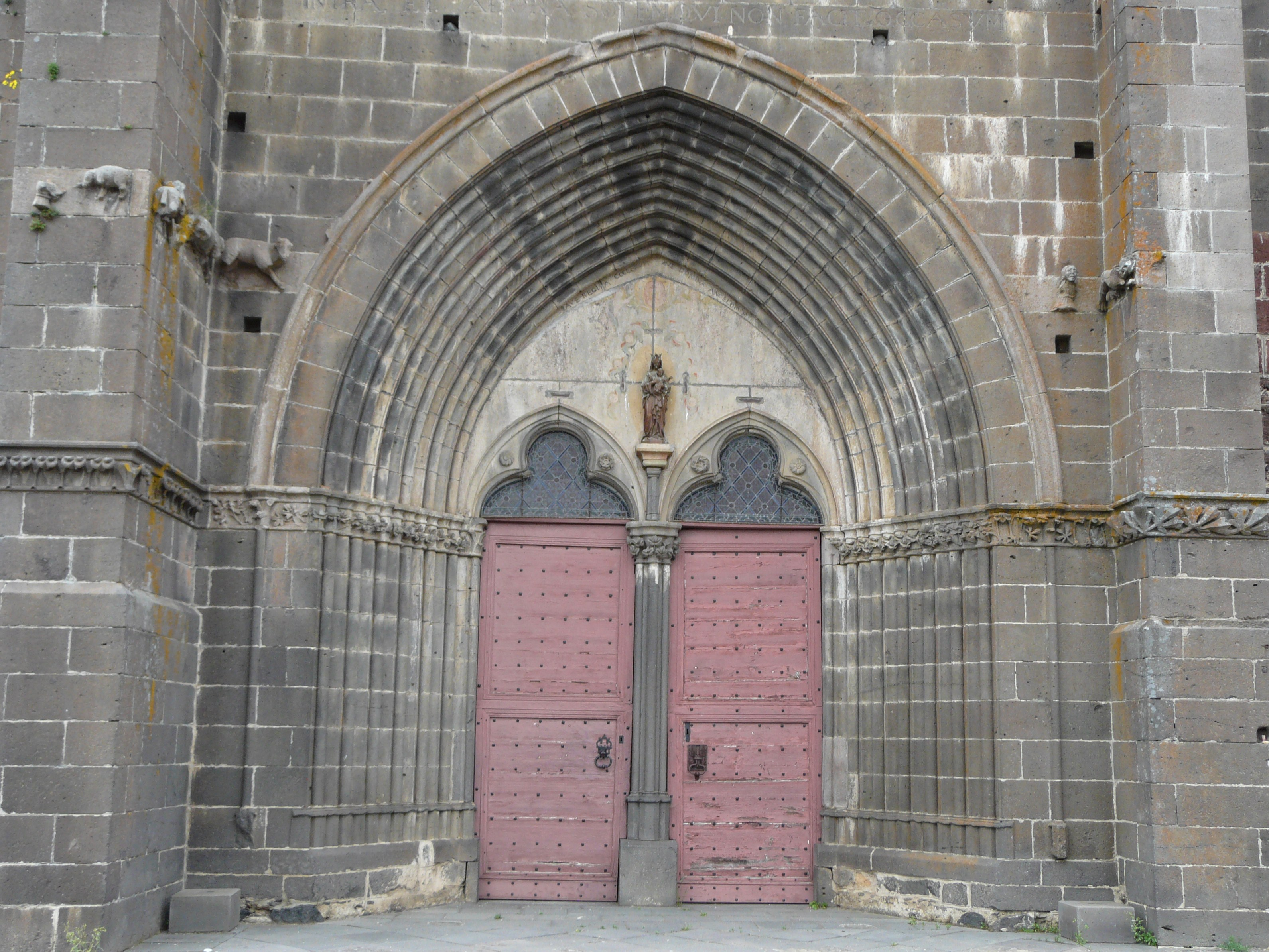 Le portail de l'église, Villedieu, Cantal, France.